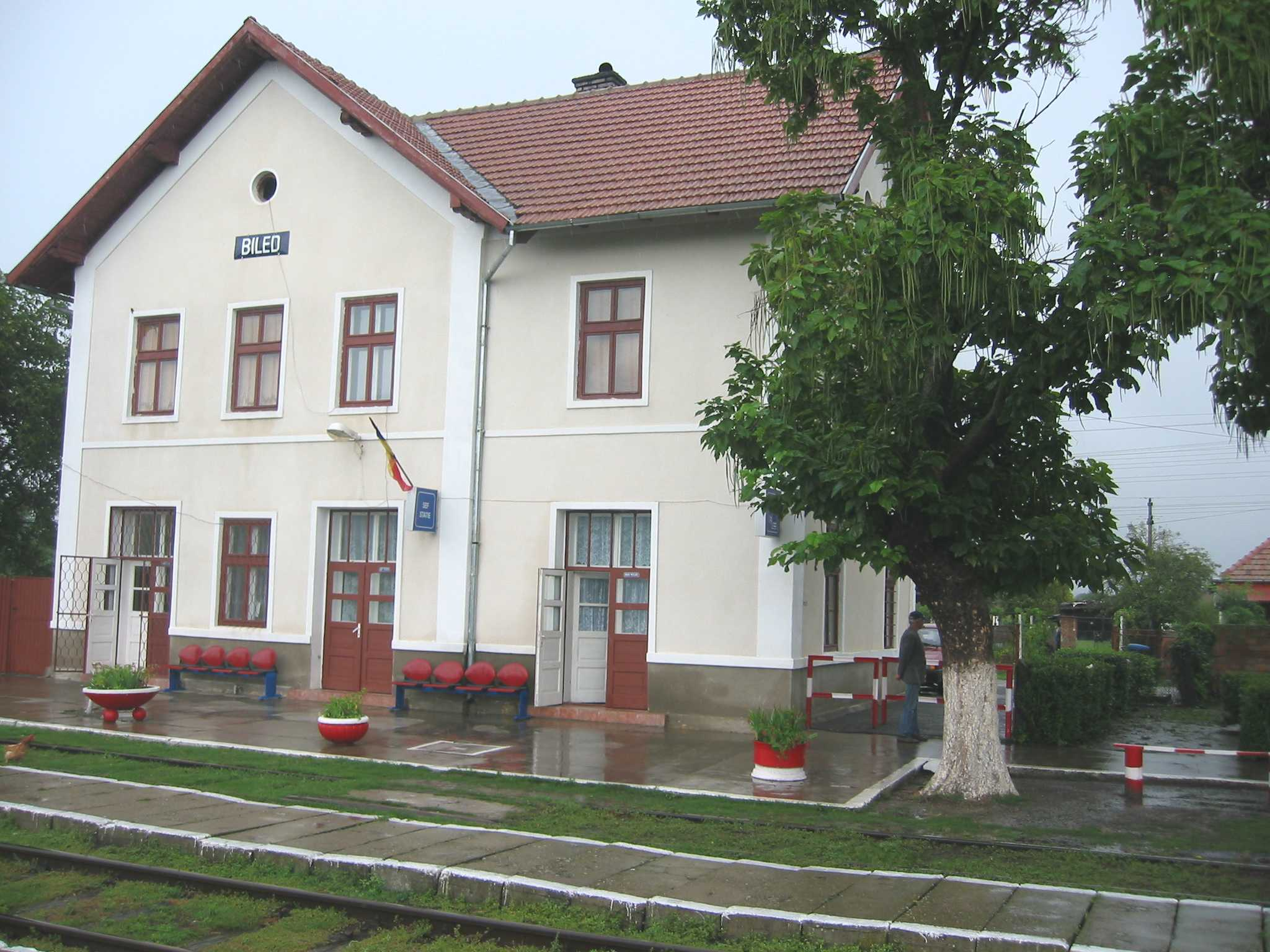 Bahnhof Billed